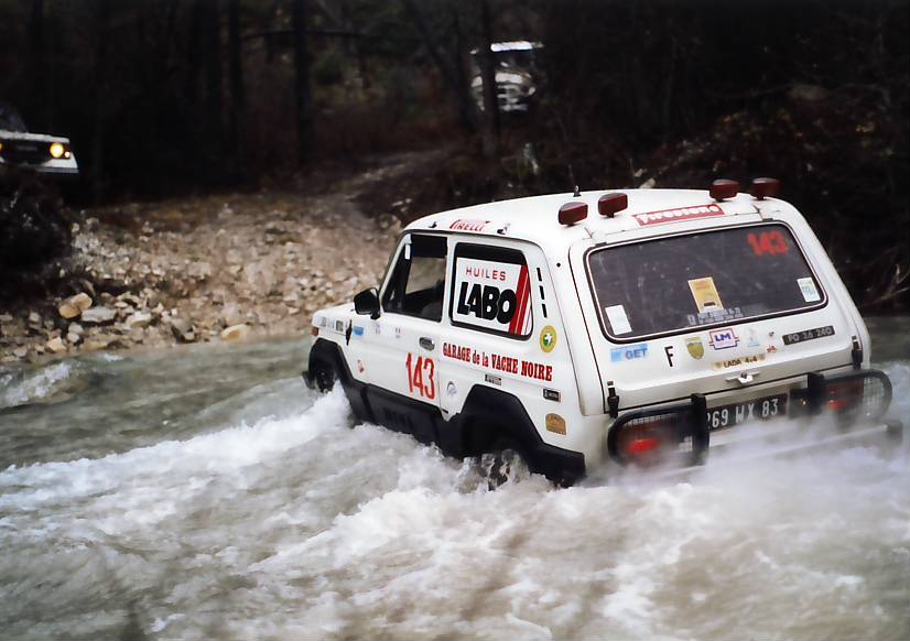 Franchissement de gué